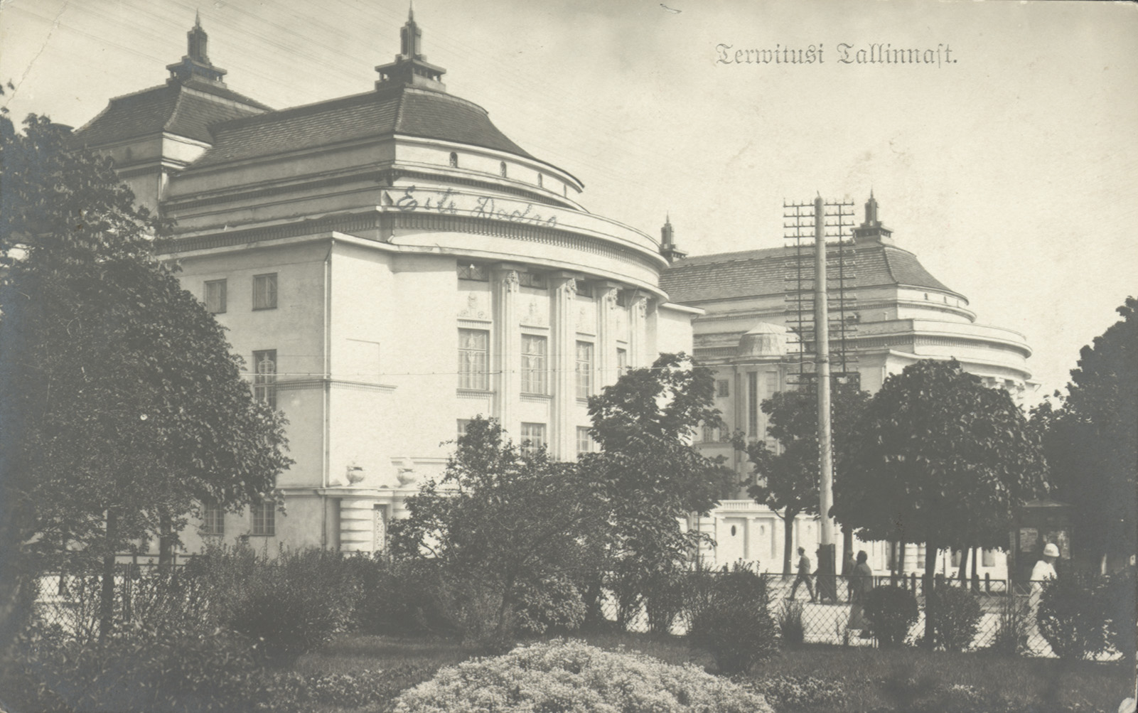 Teater "Estonia"